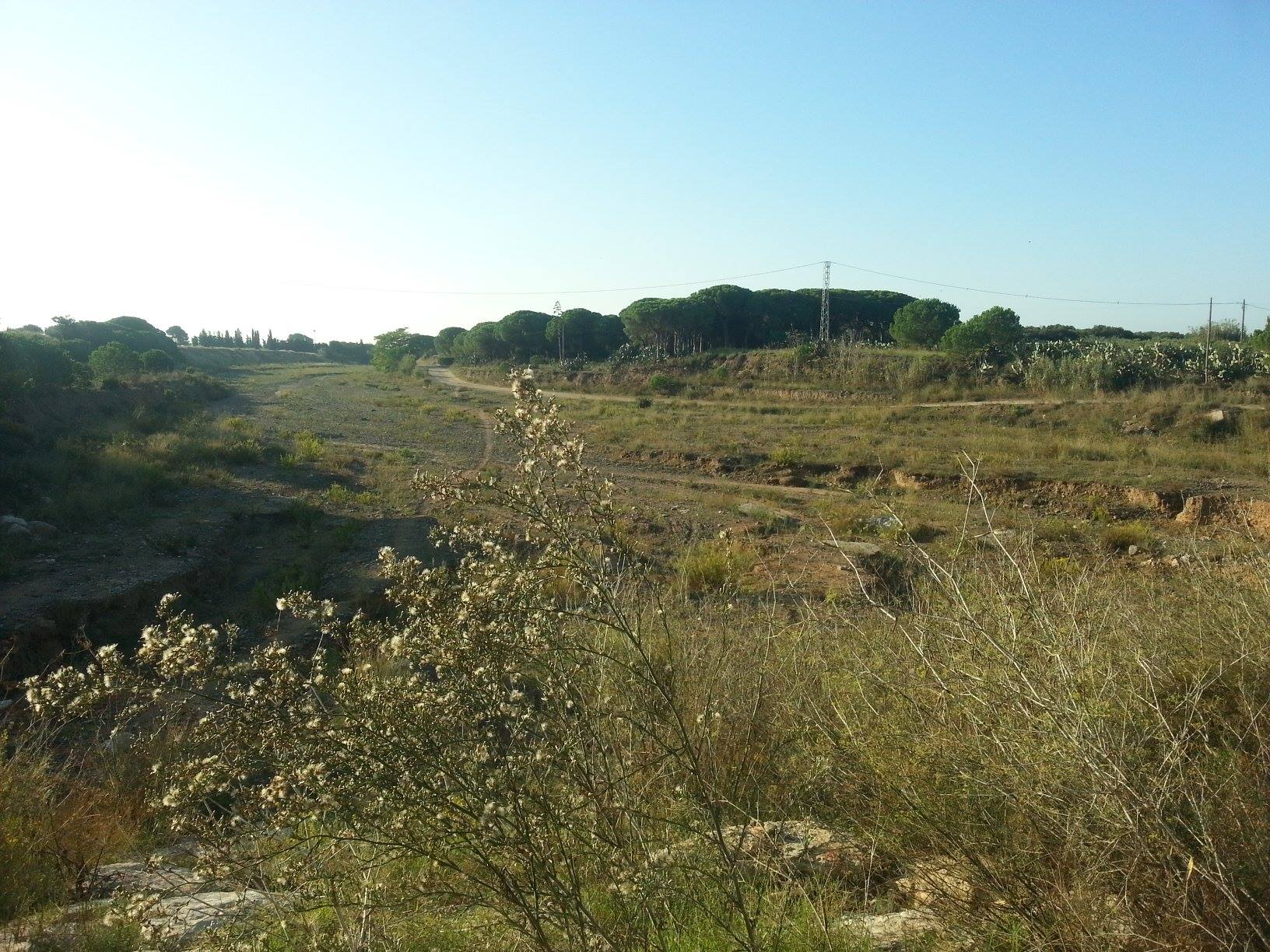 Riera d'Alforja a Cambrils